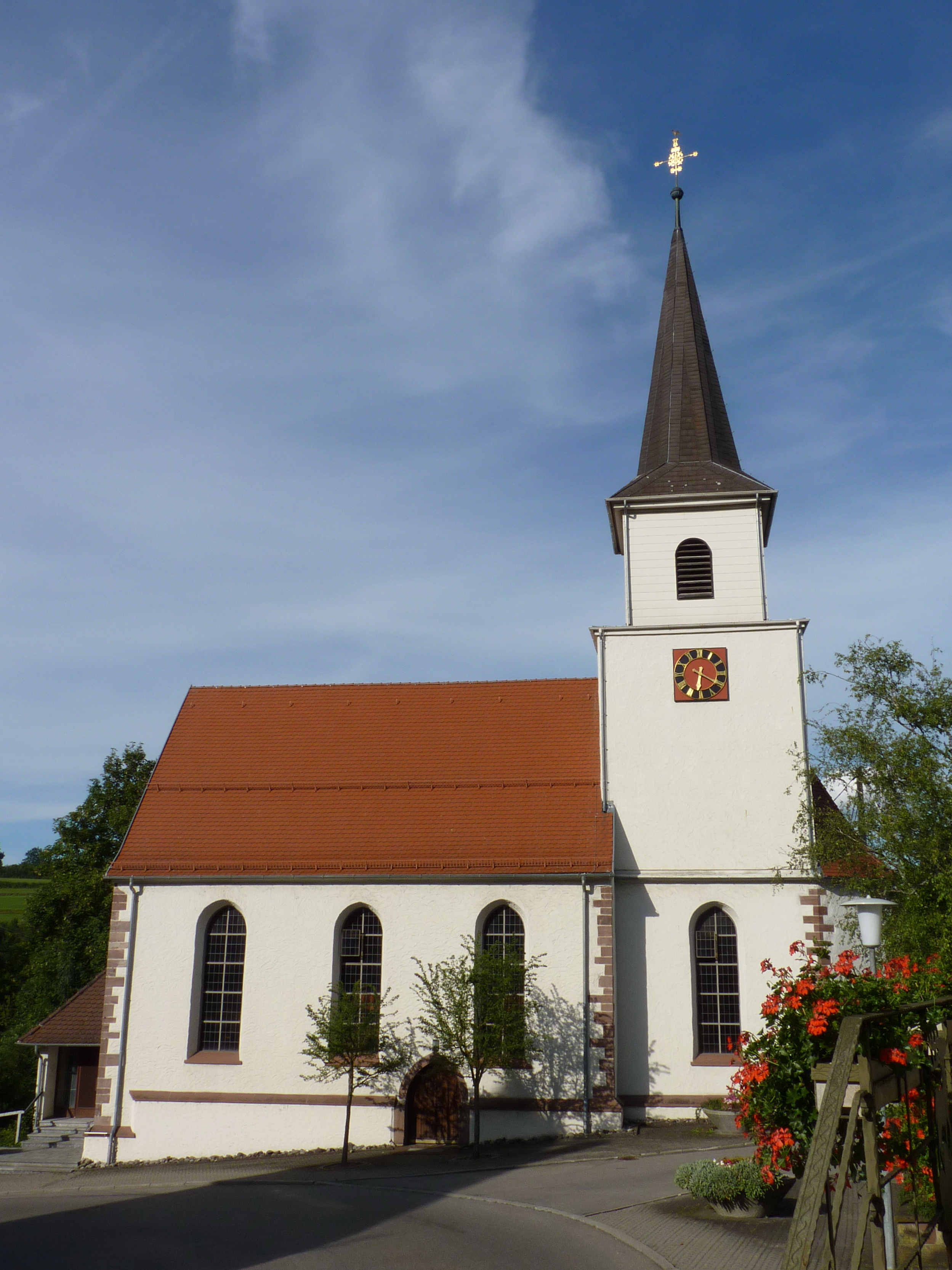 evangelische Kirche in Zimmern-Flözlingen, erbaut 1717, Westfassade